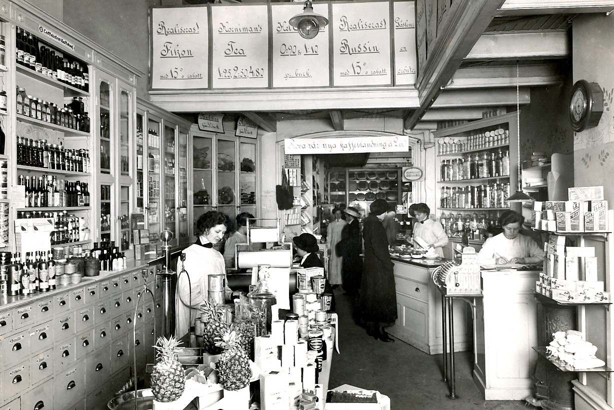 Interiör på Svenska hems matvarubutik, Jakobsbergsgatan